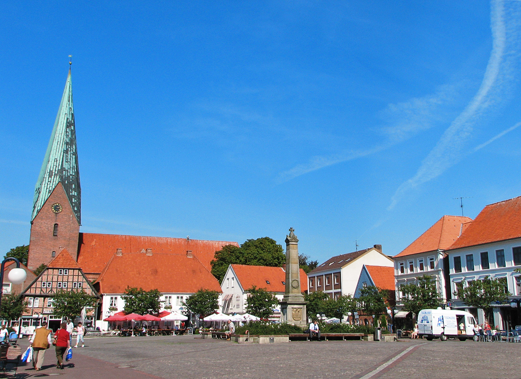 Beschreibung: Marktplatz von Eutin Fotograf: Darkone, 5. September 2005